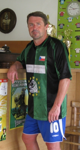 Ohnišťany Malá kopaná červenec 2013